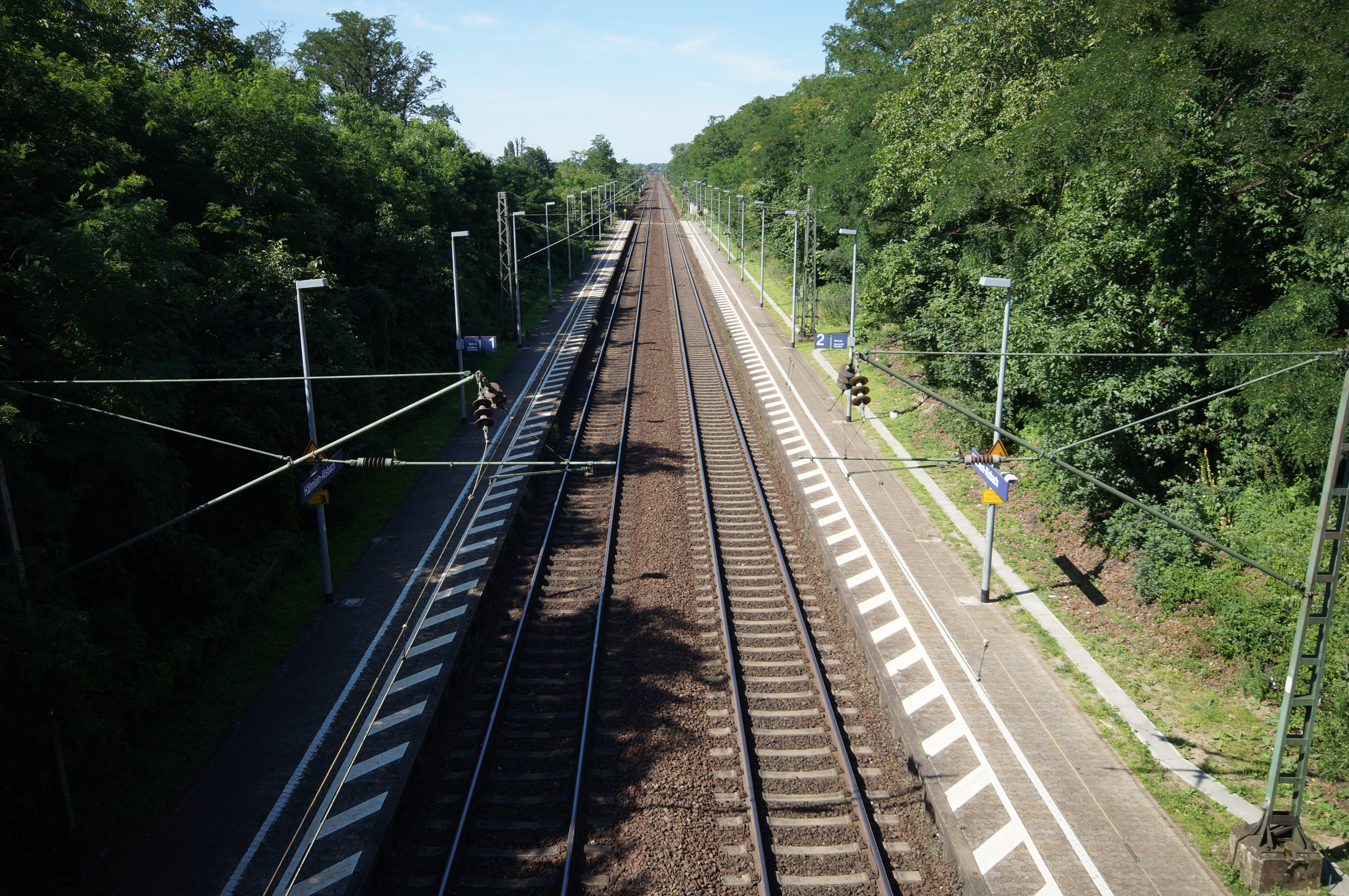 Der Alsbach-Hähnleiner Bahnhof auf der Main-Neckar-Eisenbahn